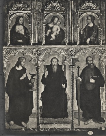 Nel comparto superiore, la Madonna col Bambino tra le sante Agata e Apollonia; nell'inferiore, i santi Giovanni Evangelista, Mauro e Paolo. Polittico firmato, tavola 167 x 120 cm., Genova, Palazzo Bianco